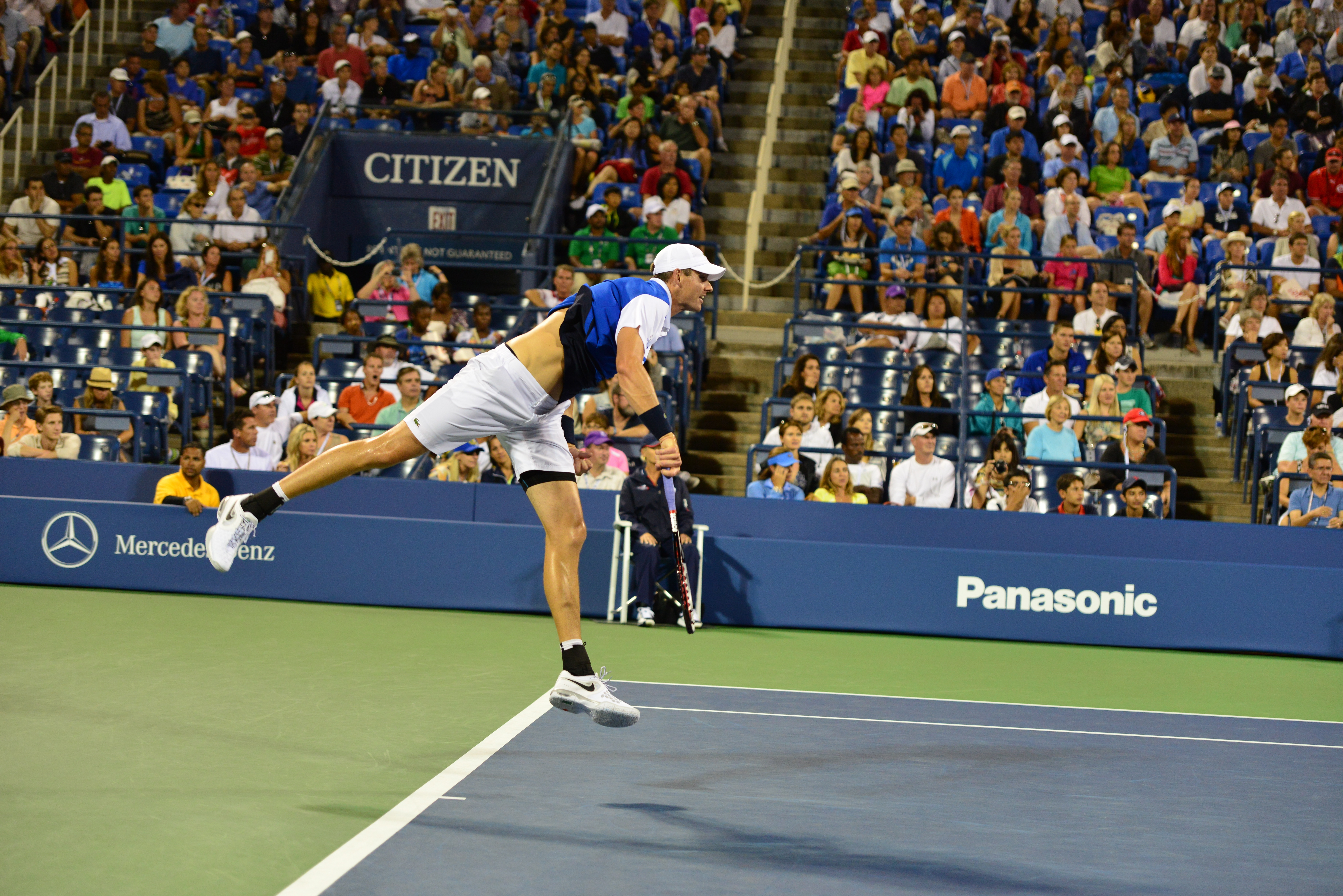 John Isner vs Gael Monfils US Open 2013